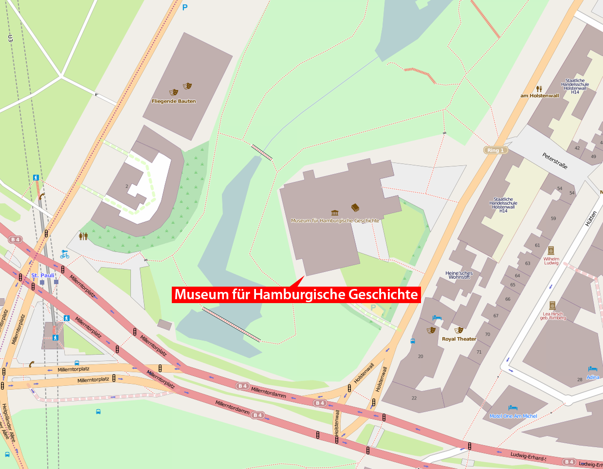 Karte des Museums für Hamburgische Geschichte in Hamburg, Deutschland.